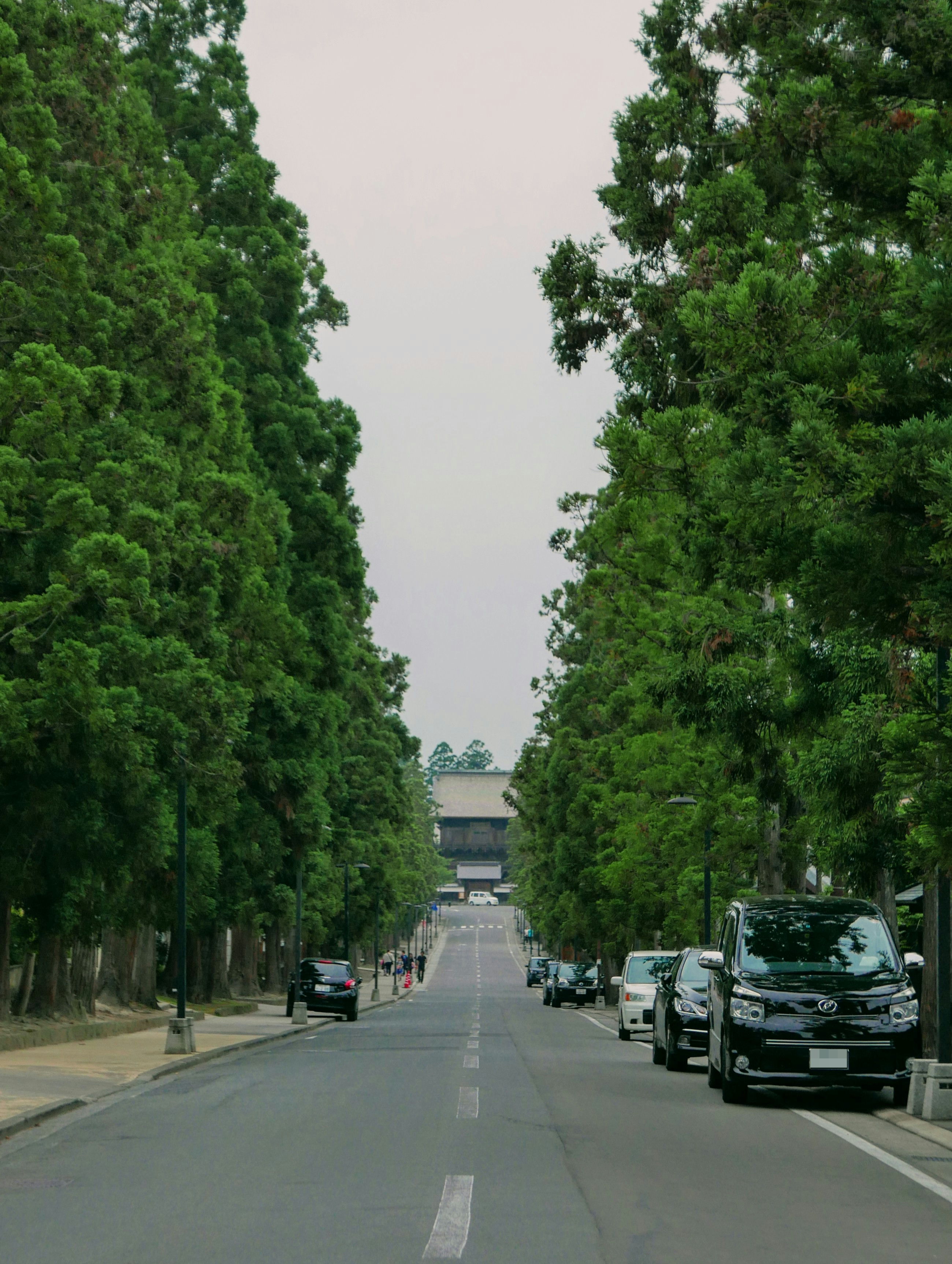 禅林街(青森県弘前市西茂森)の様子。判読される恐れがある車のナンバープレートにモザイク処理を実施。